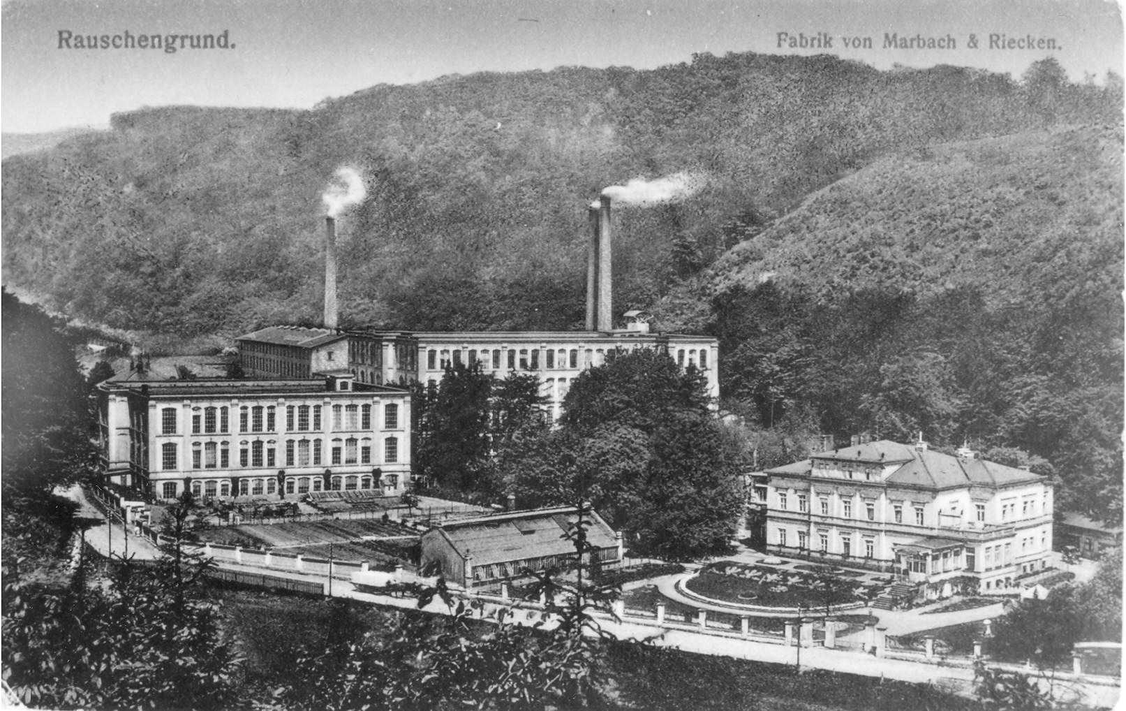 Gebäude der Firma Marbach und Riecken in Šumná (Rauschengrund) bei Litvínov in Tschechien.